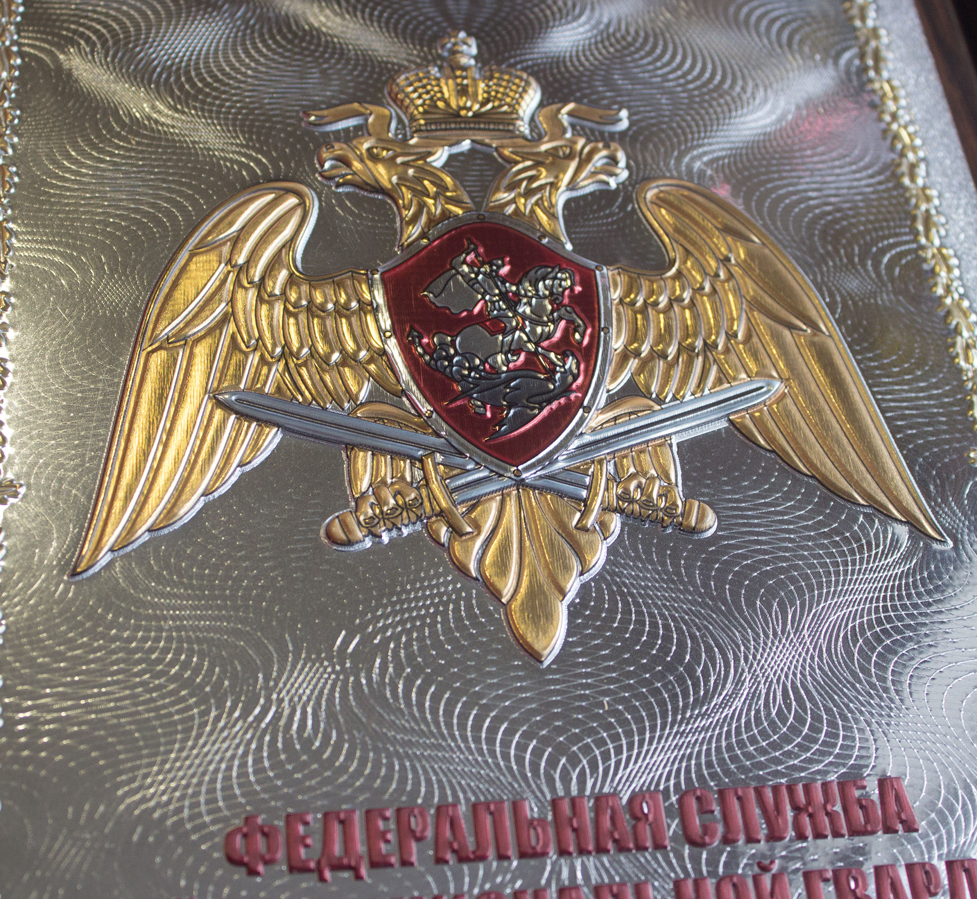 Прямоугольные плакетки с барельефным тиснением. Это новый вид плакеток с рельефом. Шильды делаются по технологии барельефных магнитов, но площадь изделия гораздо больше. Высота рельефа при желании может достигать 3 мм, с высоким качеством проработки мелких деталей.